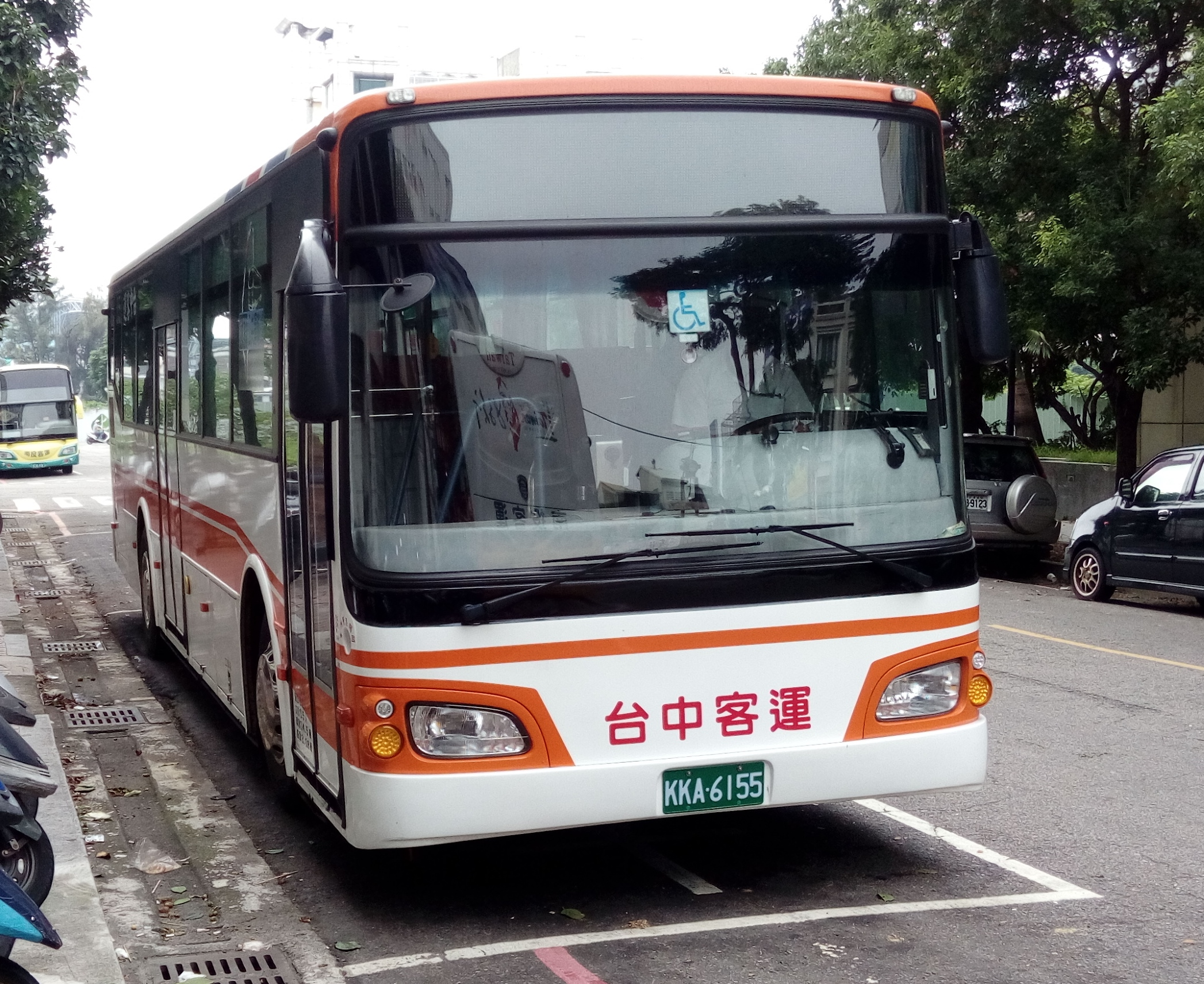 KKA-6155(2016)HINO RK8JRVA-KJF(固亞)(雙門大復康)攝於干城站附近 2017-09-07 07:41:19